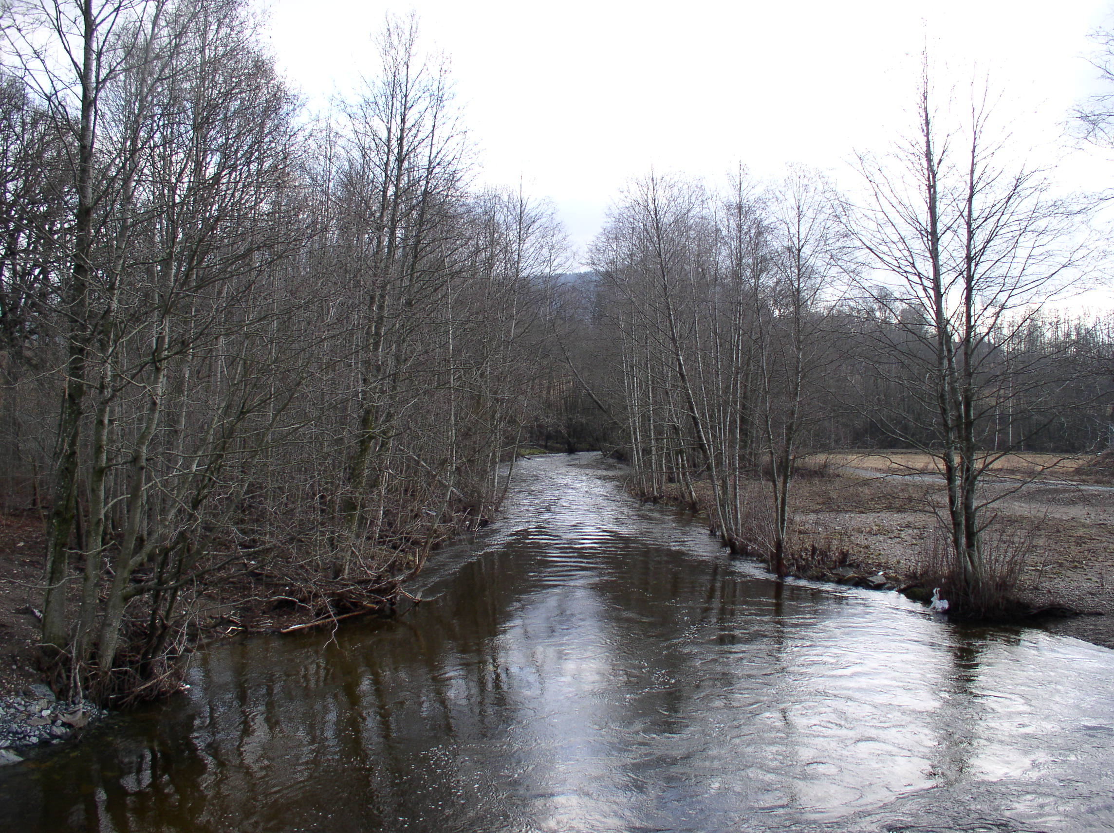 Isielva nedenfor Kølabrua april 2007. I bakgrunnen skimtes Kolsåstoppen.